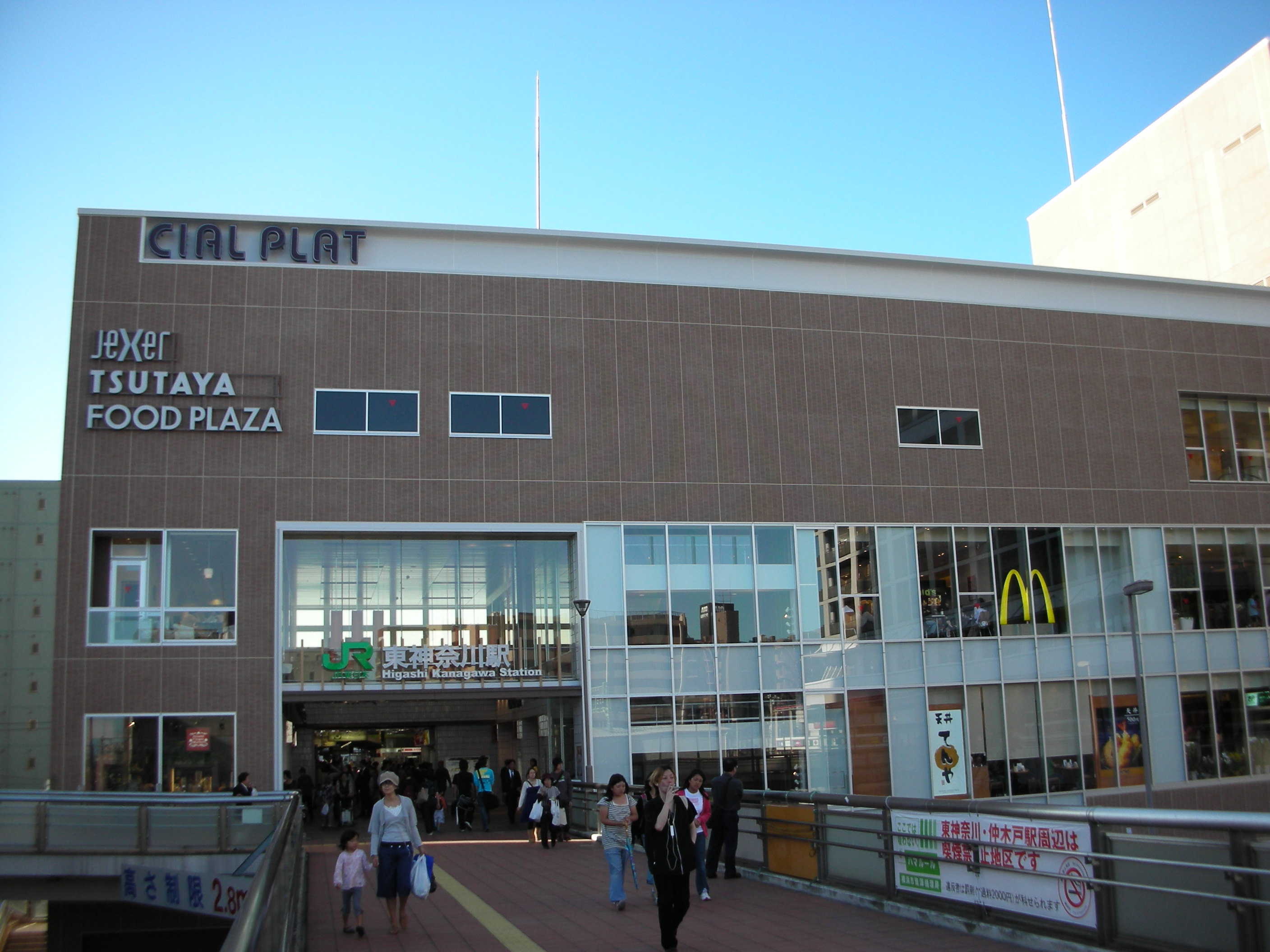 東神奈川駅東口の外観